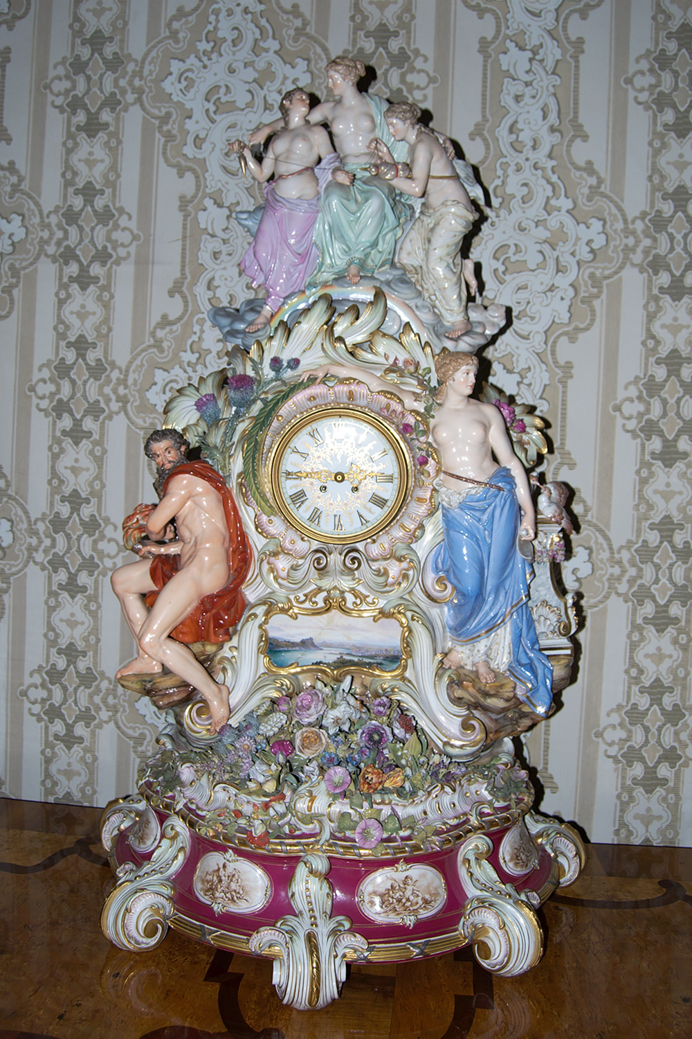 Zámek Lysice - stolní hodiny z míšeňského porcelánu z období druhého rokoka (druhá polovina 19. století) v Rohovém, šedém salonu. Autorem je E. Anderssen.